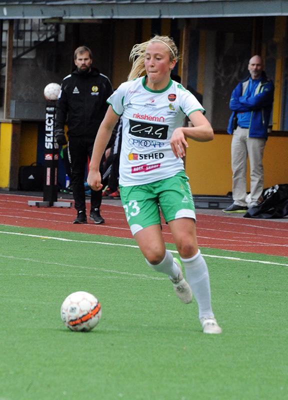 Julia Karlernäs